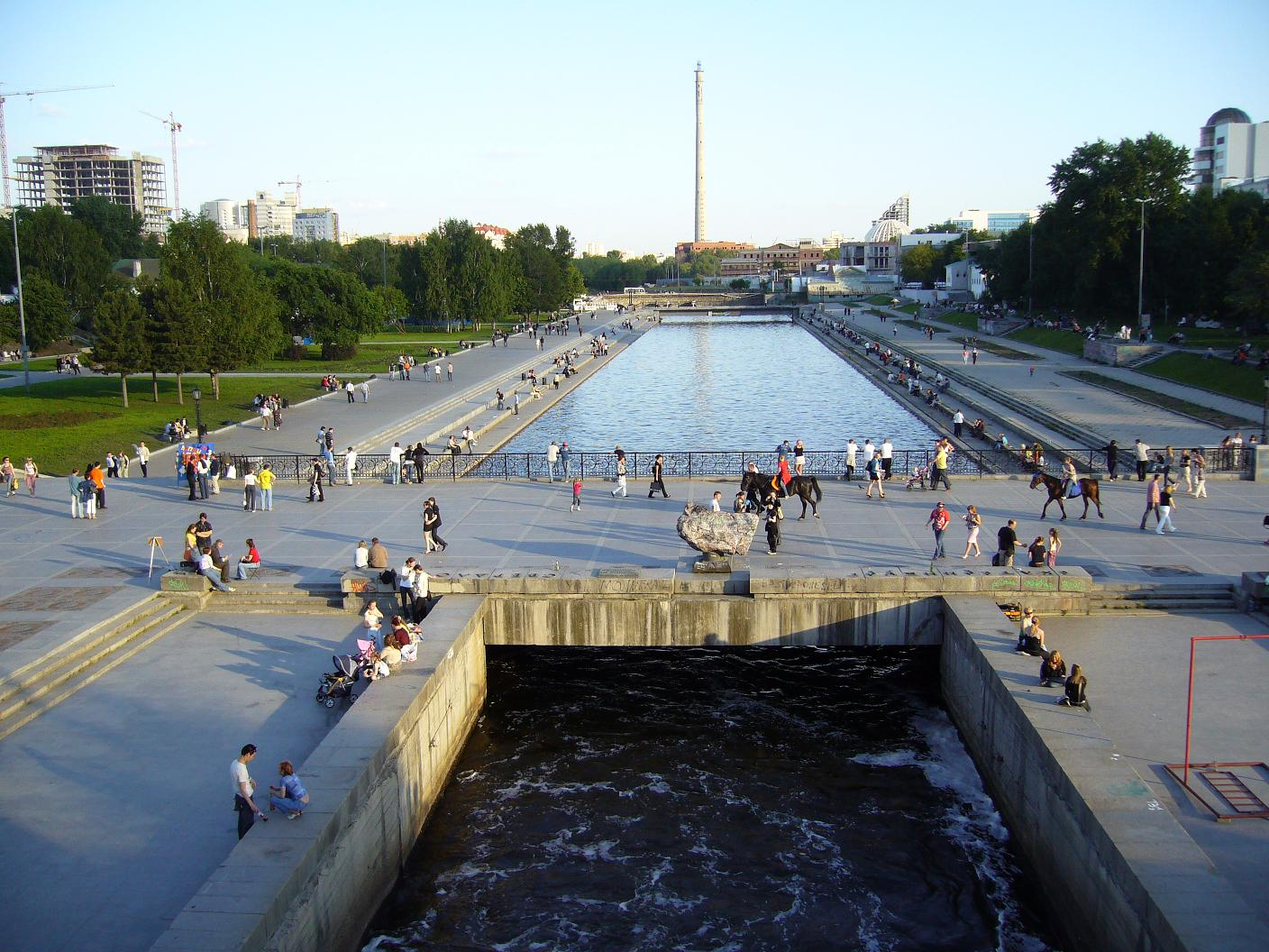 Плотинка